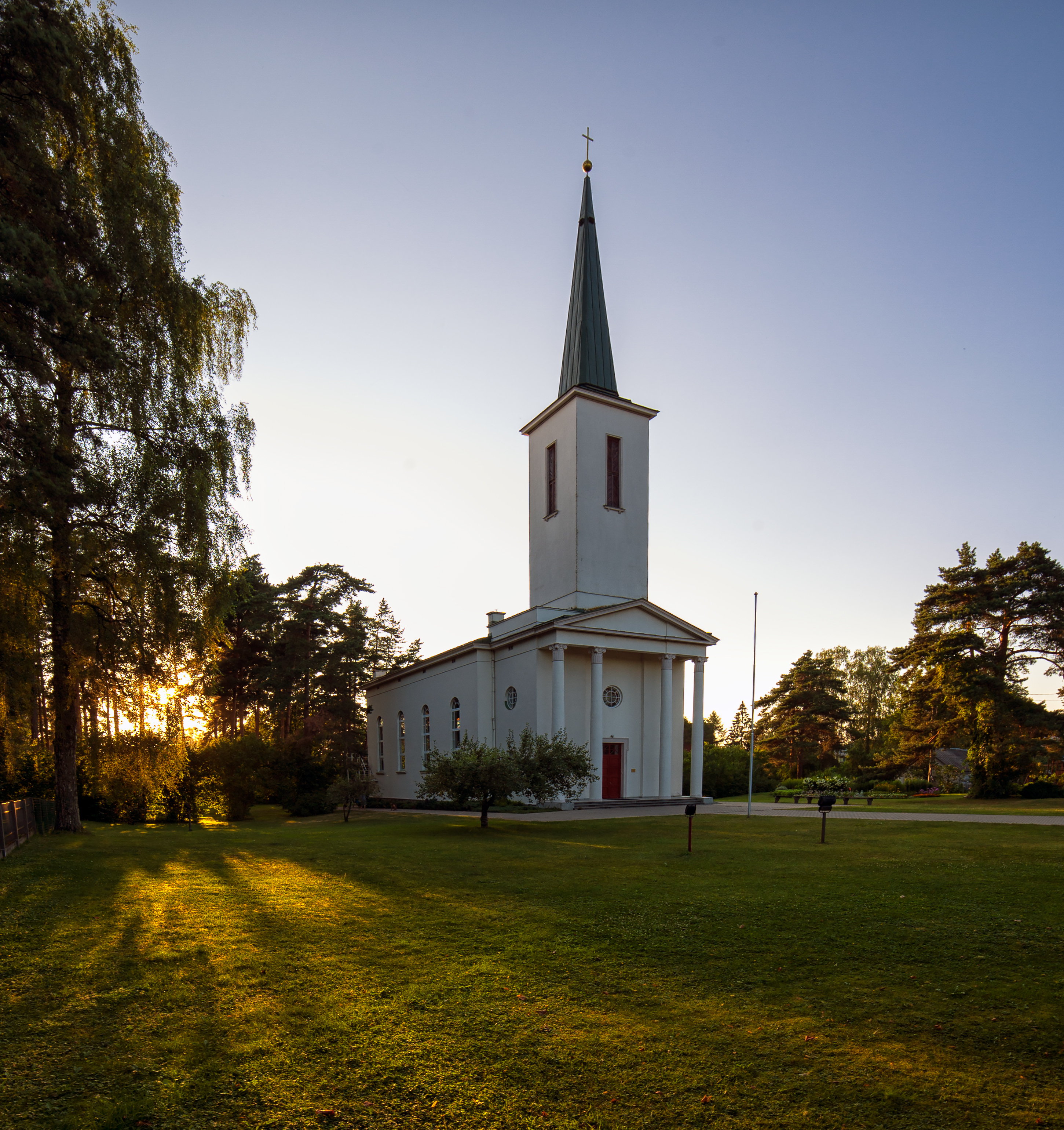 Ikšķiles luterāņu baznīca, Ikšķile